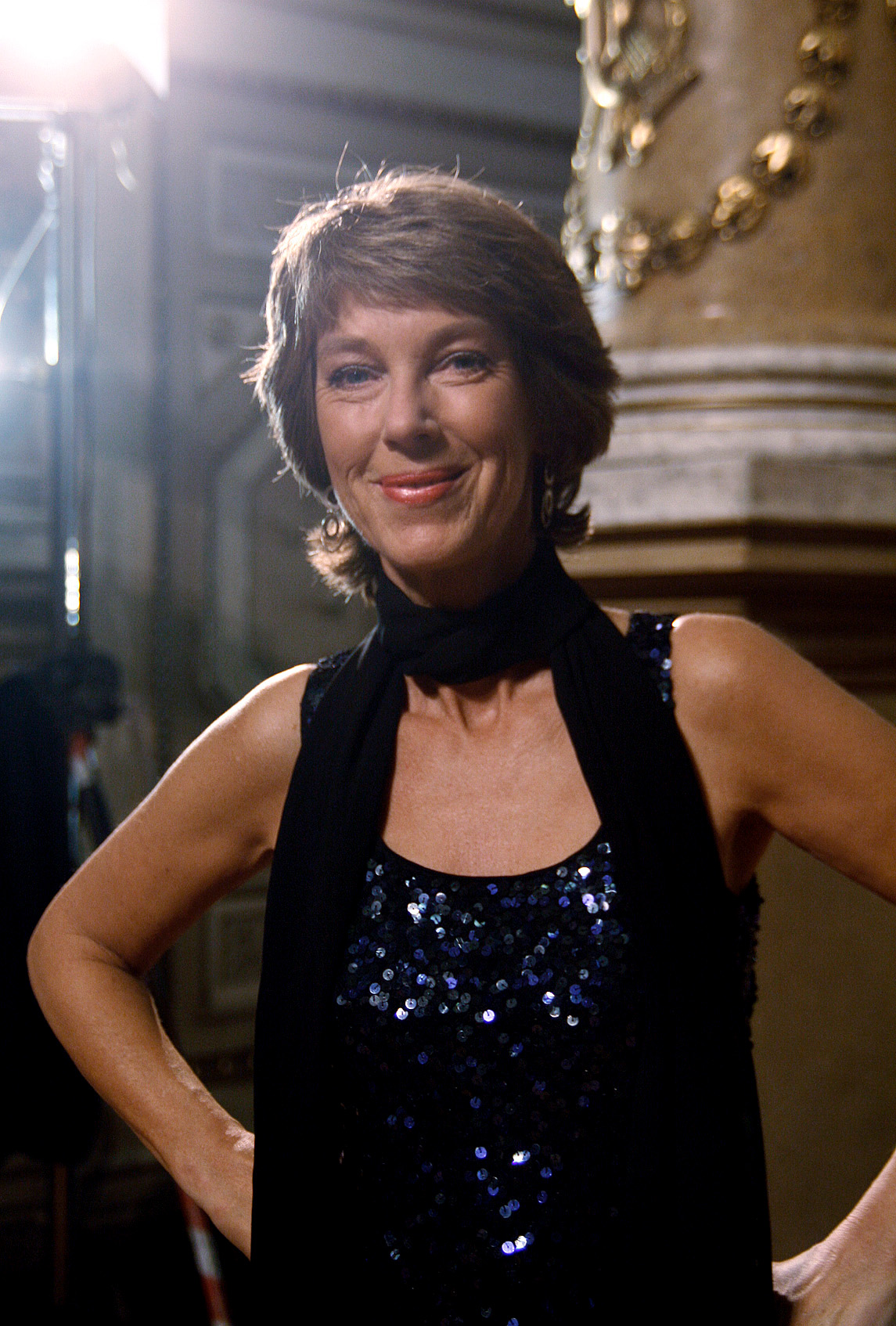 Barbara Rett berichtet für den Österreichischen Rundfunk von der Verleihung des Nestroy-Theaterpreises 2010 im Burgtheater in Wien.